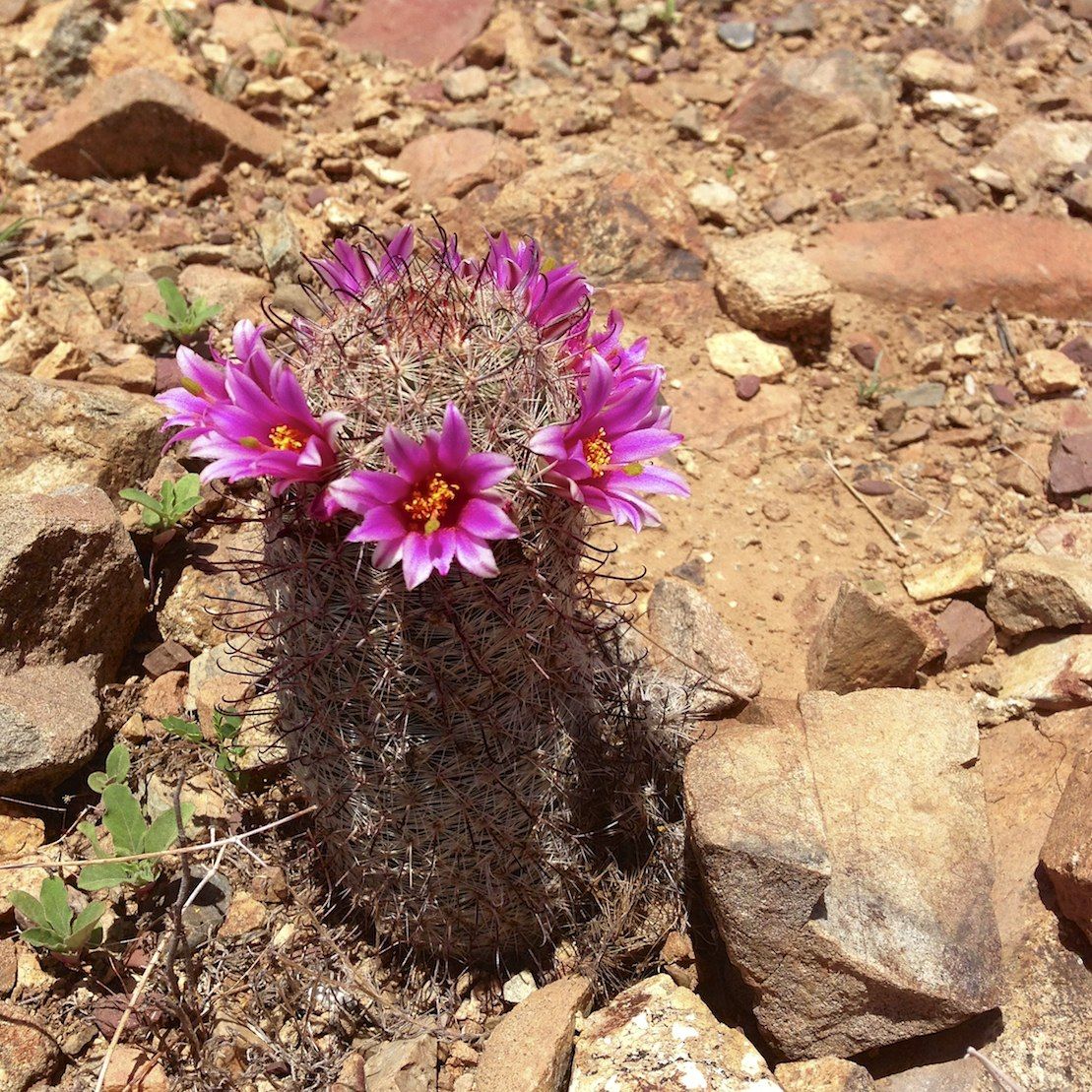 IMG_3763 - Version 2